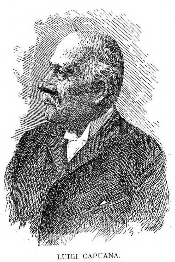 Immagine da Giacinta